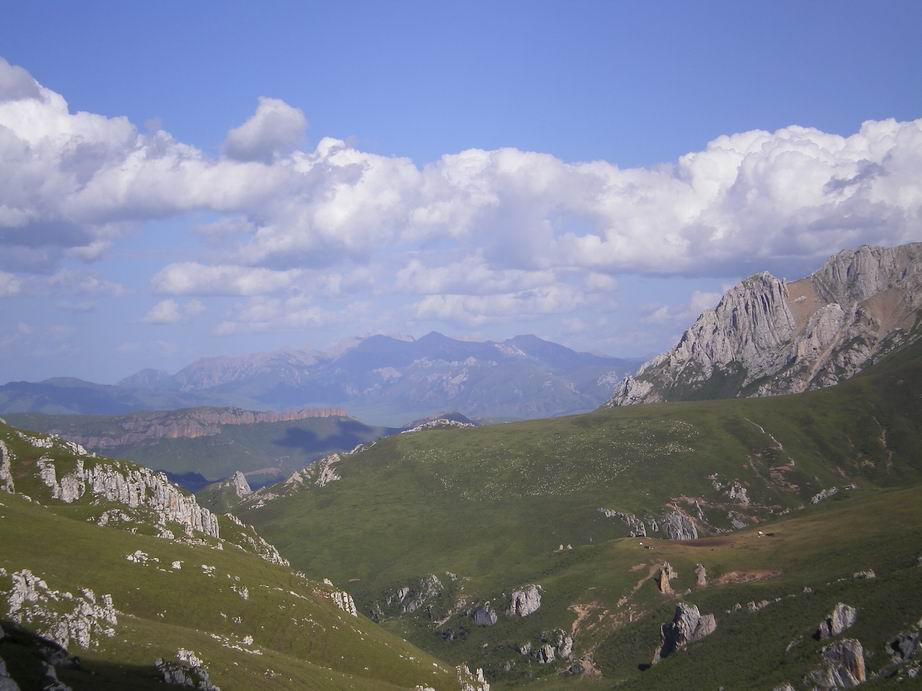 נוף במחוז גאנסו, סין רישיון נוצר על ידי משתמש:Gsella